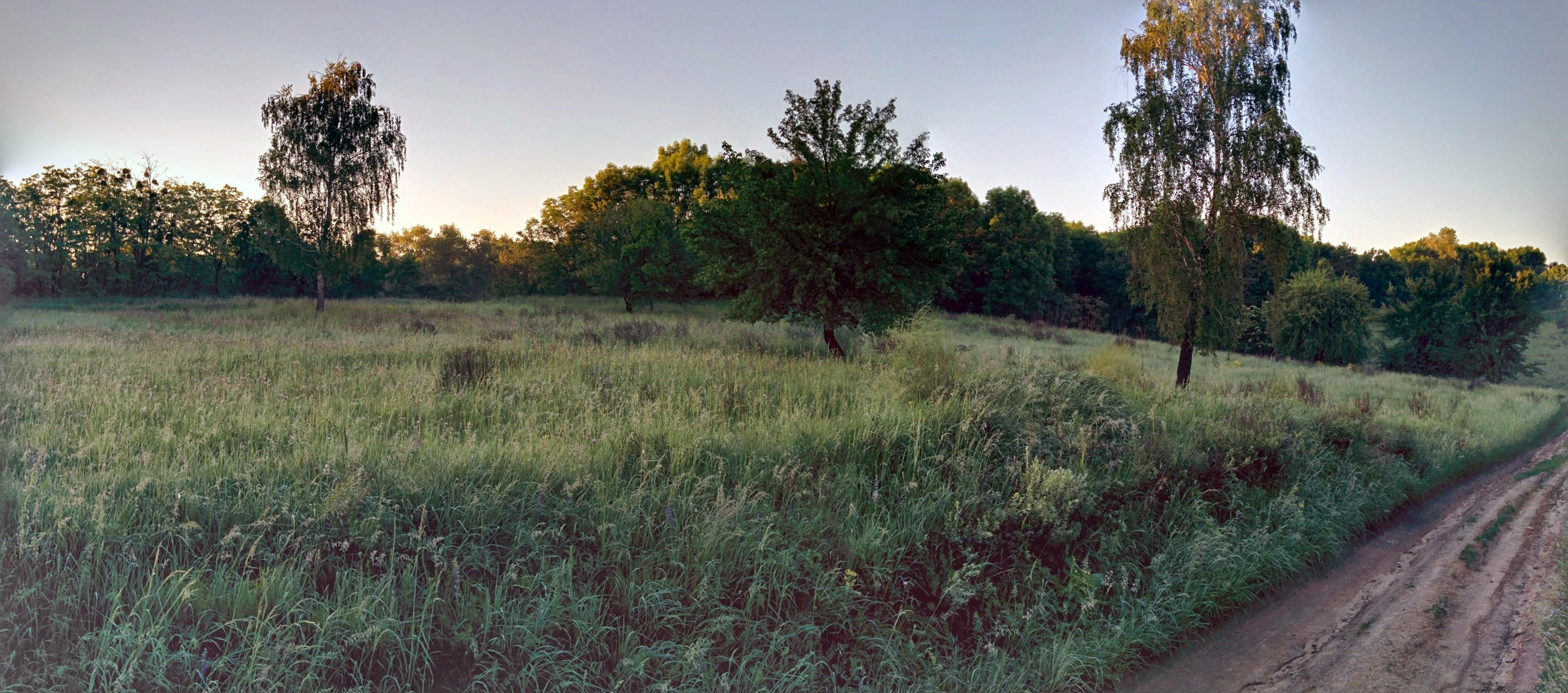 «Лиса Гора», Голосіївський район